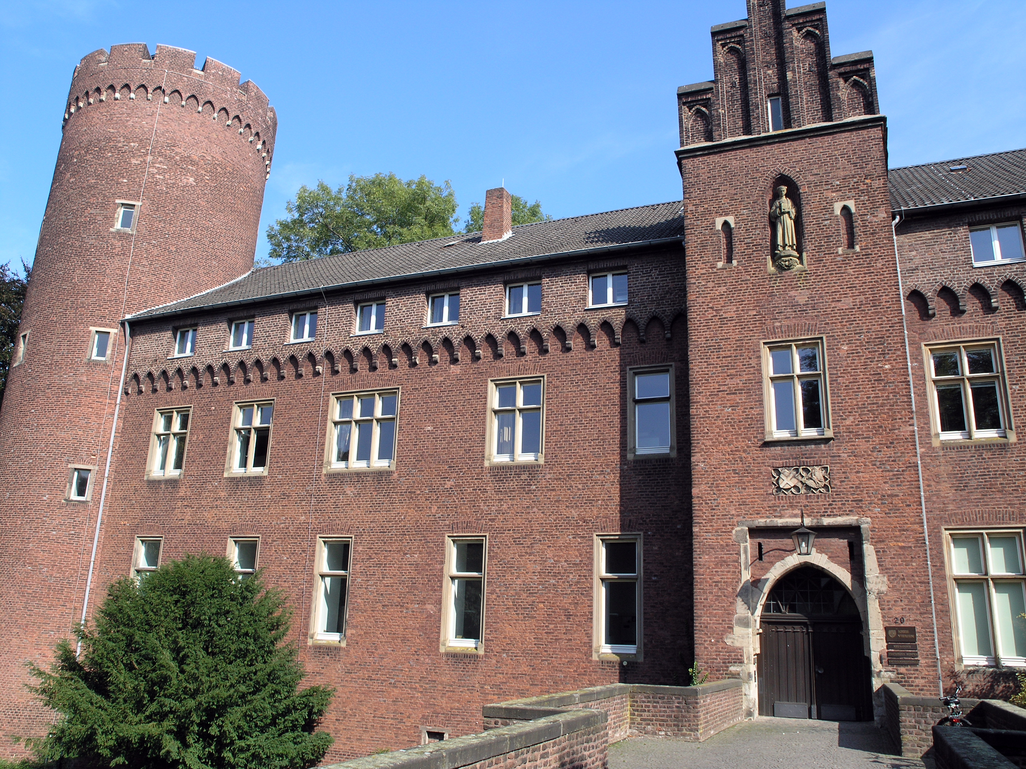 Südwest-Flügel der Burg Kempen